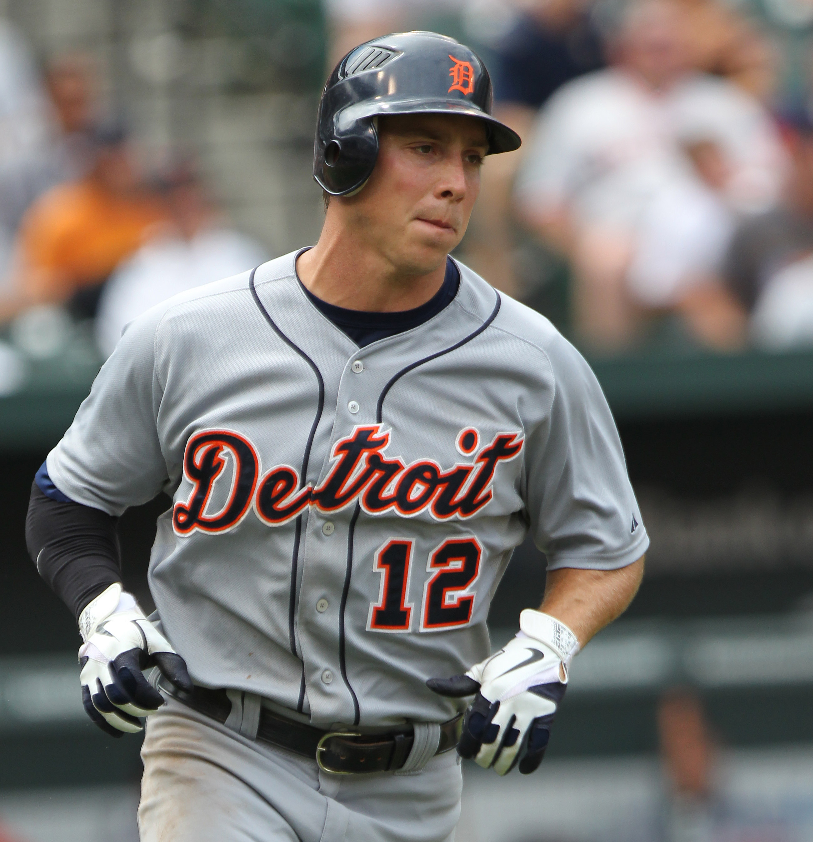 Andy Dirks